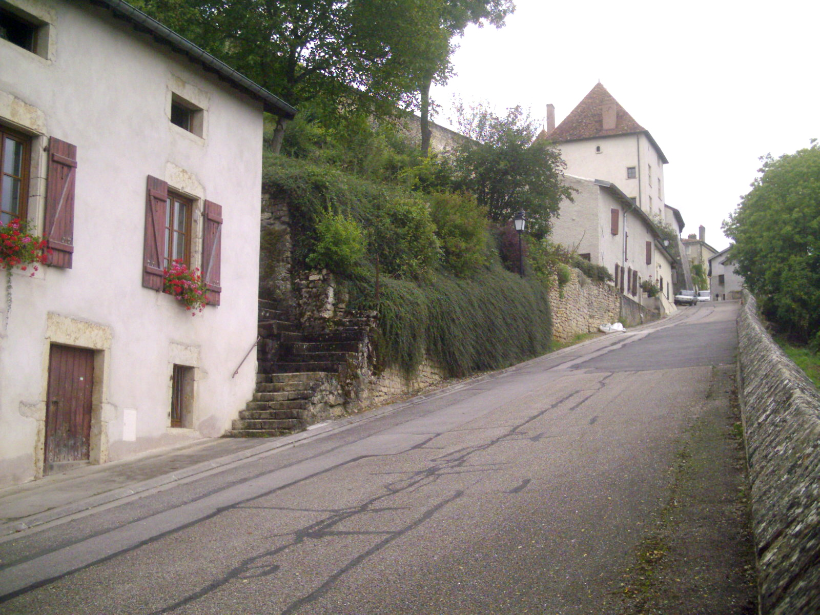 Villey-Saint-Étienne: maison forte